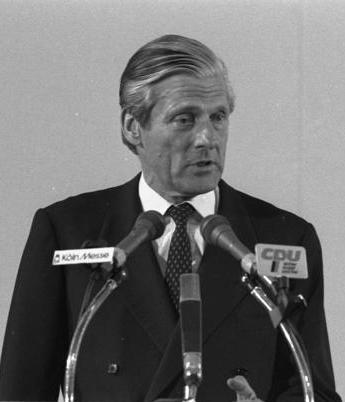 25.5.1983 31. Bundesparteitag der CDU in der Congress-Halle 8 der Kölner Messe.